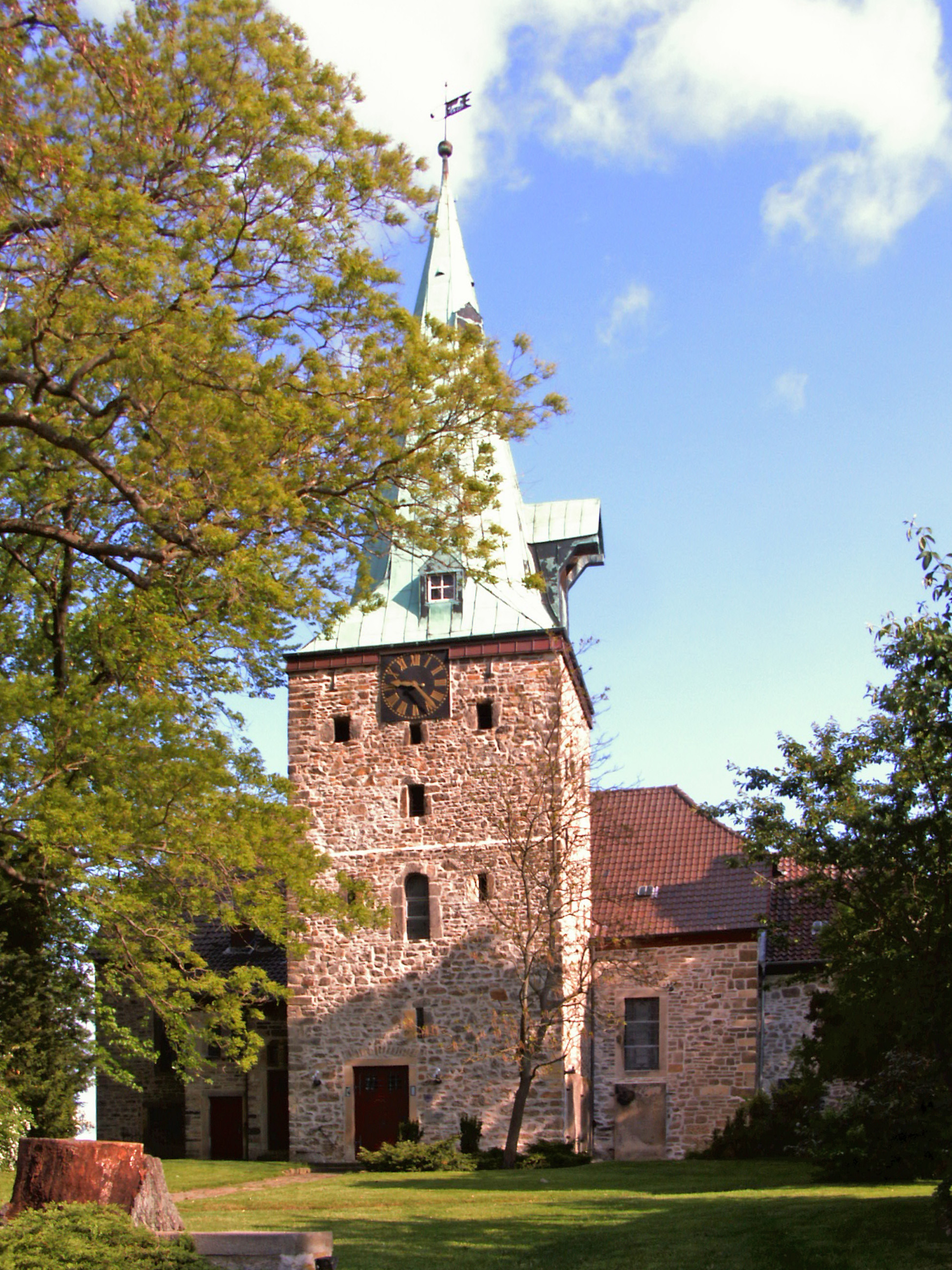 Evangelische Kirche St. Maria und St. Cyriakus in Groß Twülpstedt, Landkreis Helmstedt.